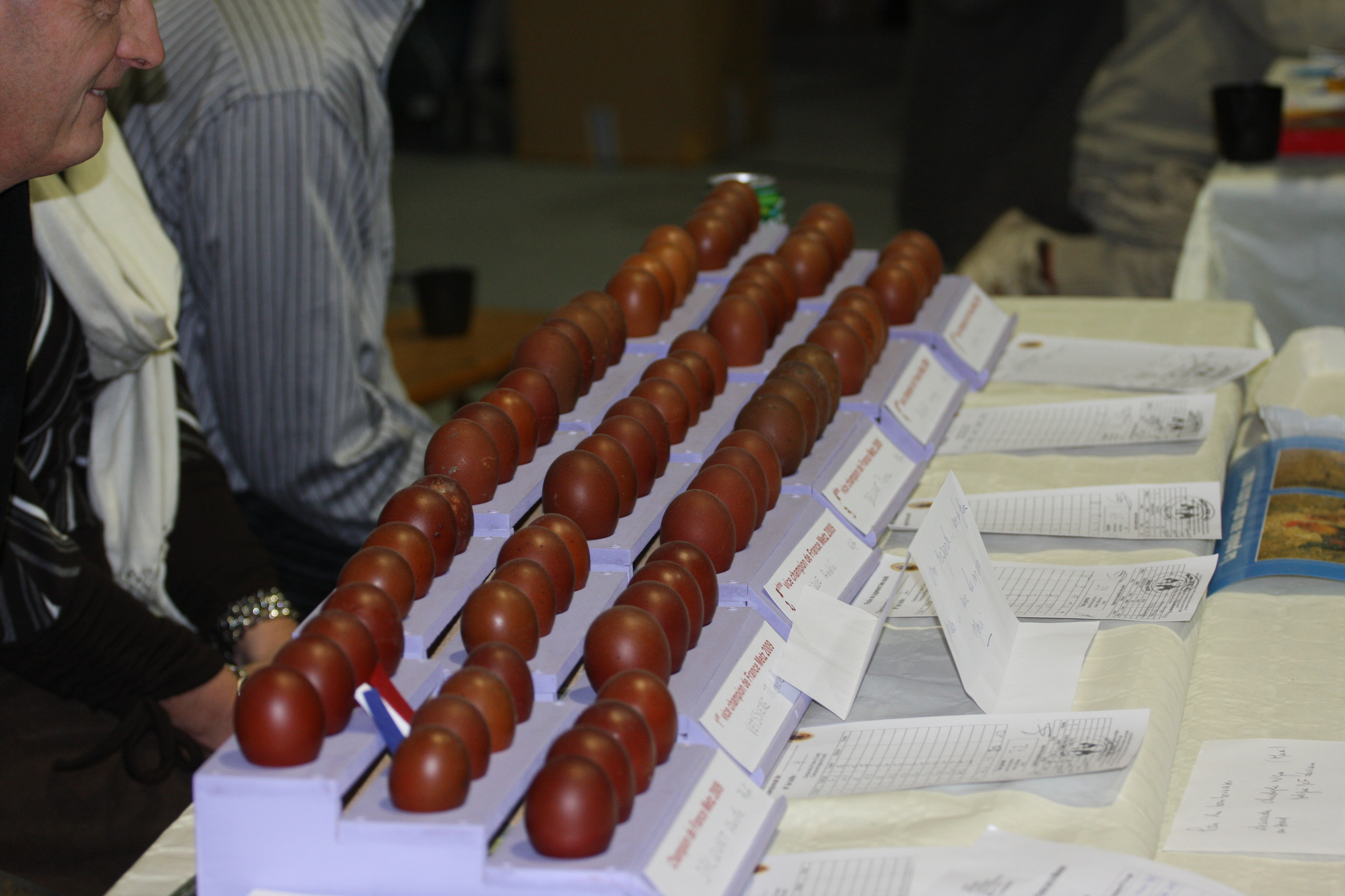 Exposition des oeufs de Marans - Metz (57) 2009